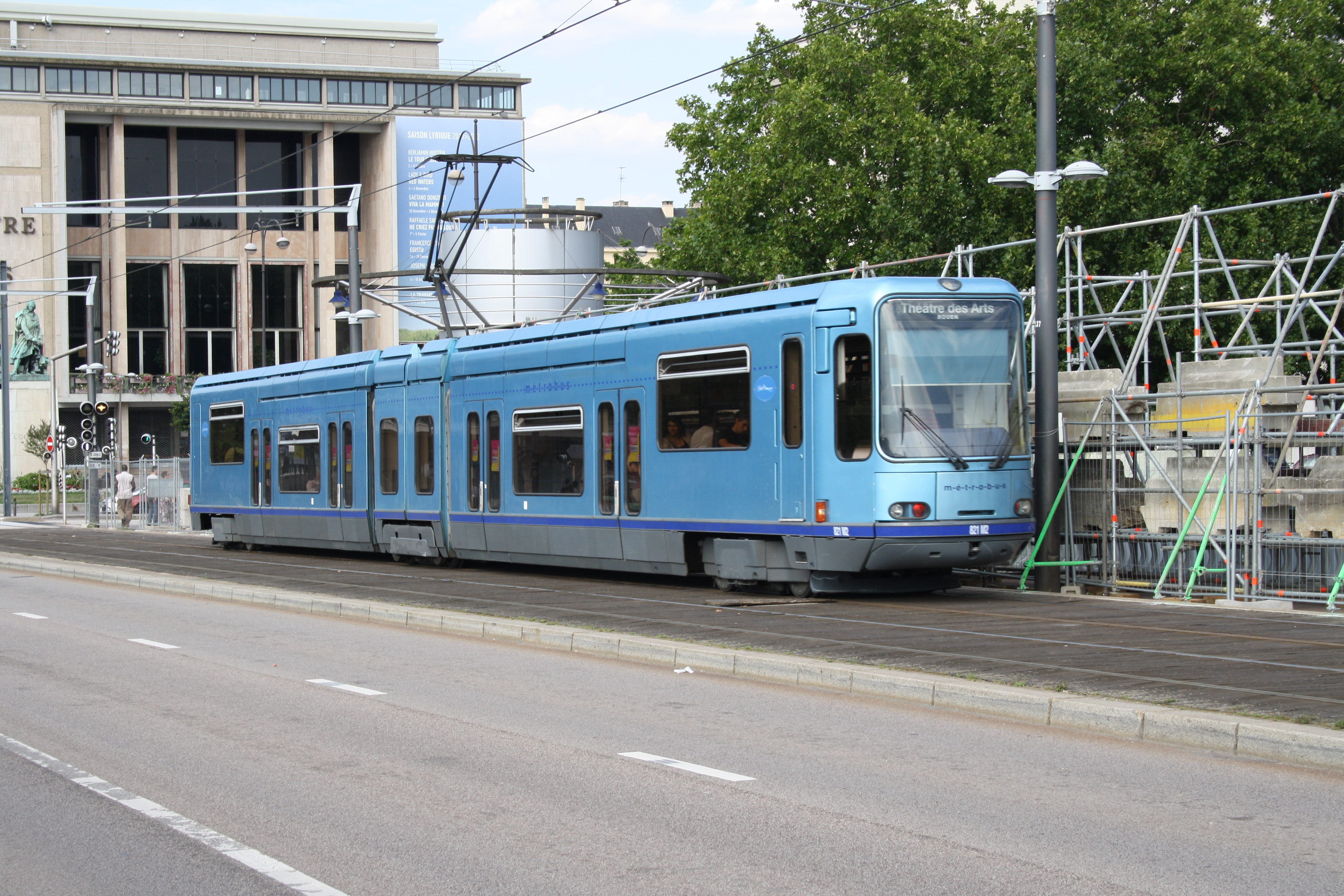 TFS in Rouen